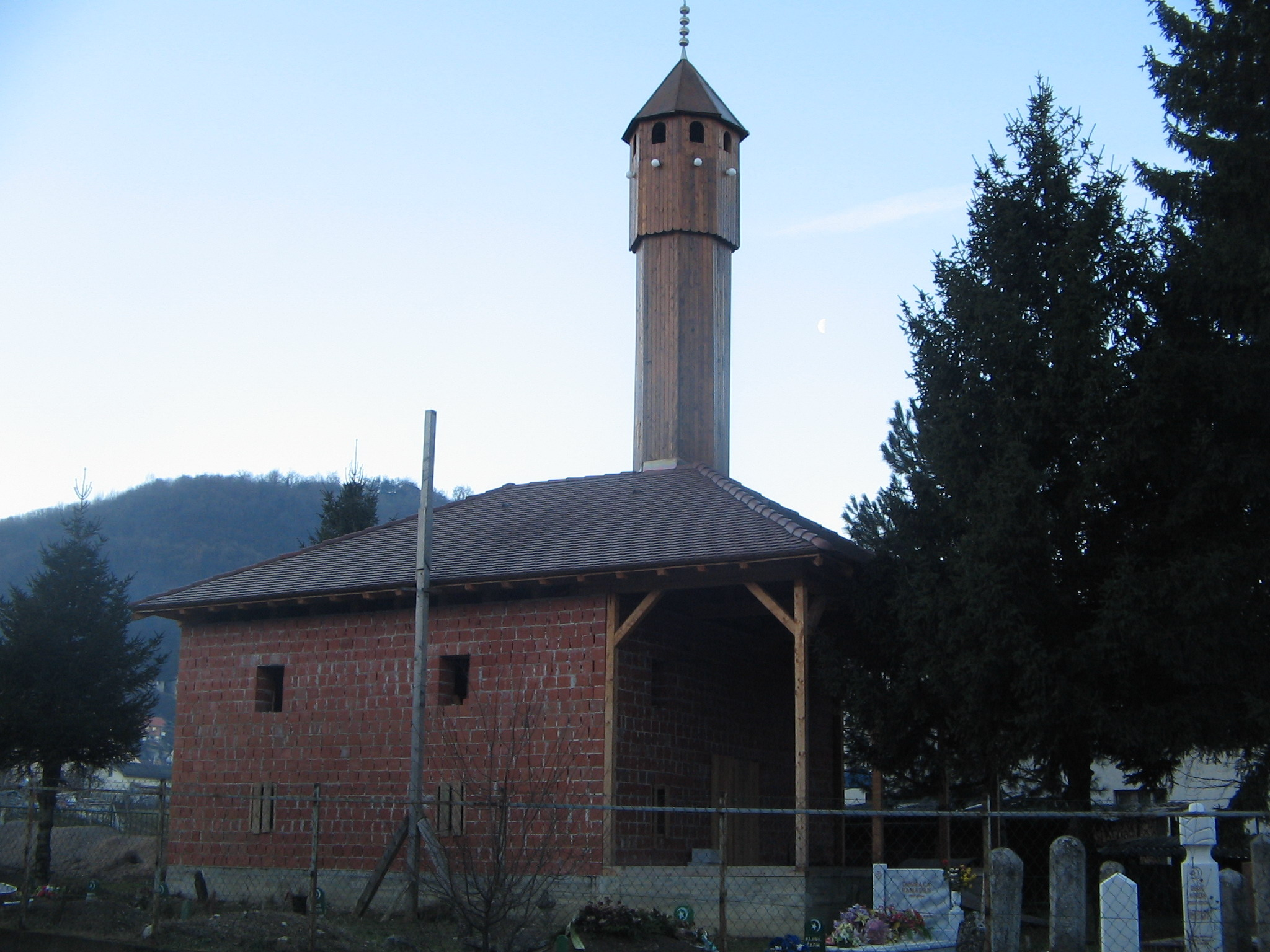 Поточка џамија (Бања Лука).